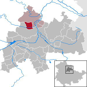 Günstedt in Thuringia - District Sömmerda